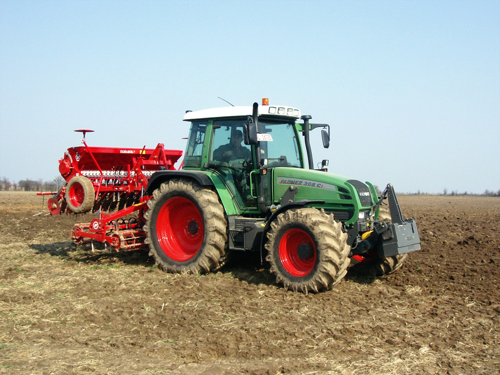 Fendt-Schlepper Farmer 308 CI